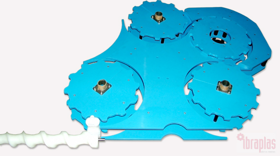 exemplo de kit de envase